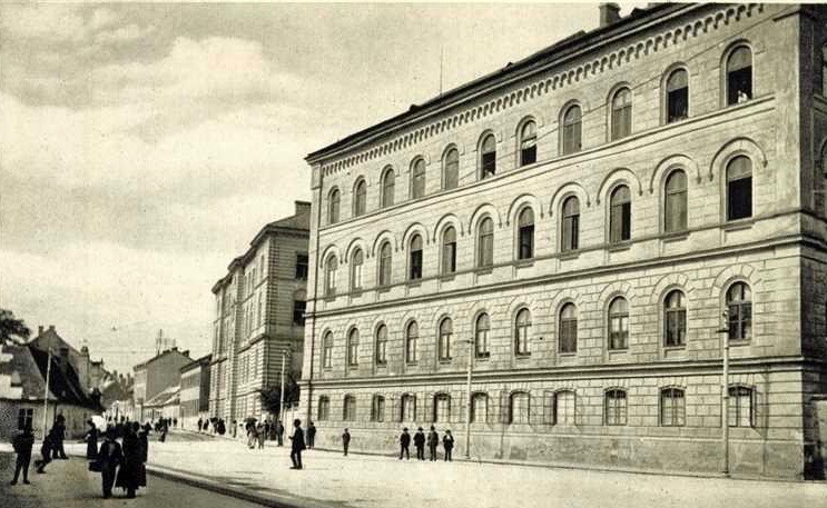 Landeshospital zu Preßburg, erbaut im Jahre 1864 nach den Plänen von Ignaz Feiger d.J.